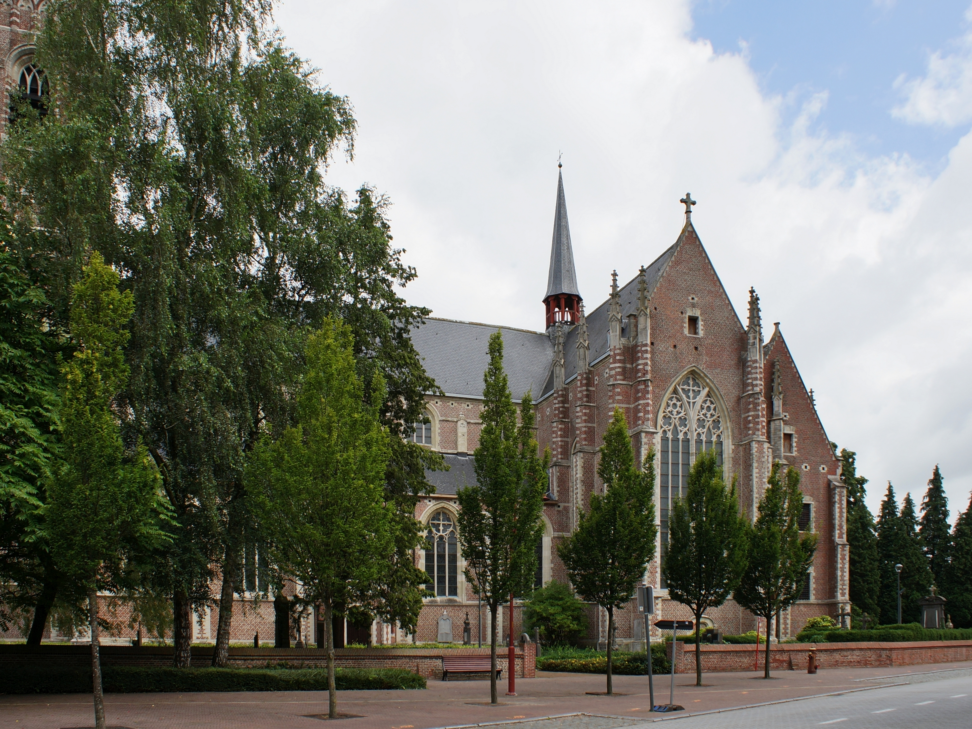 Sint-Leonarduskerk (Sint-Lenaarts). Zijaanzicht. Gevel van een transeptarm. Vieringtoren.